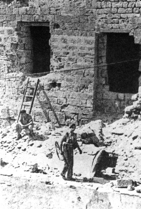 הפרצות שהובקעו בחומת כלא עכו על ידי לוחמי האצ"ל